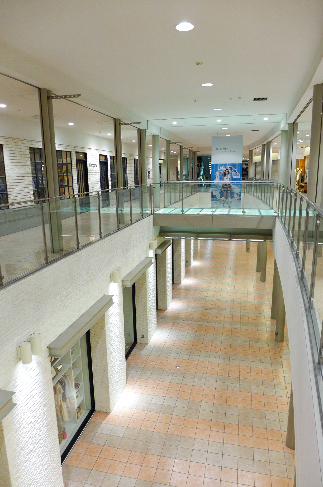 Stellar Place Sapporo Level 3-4 Void